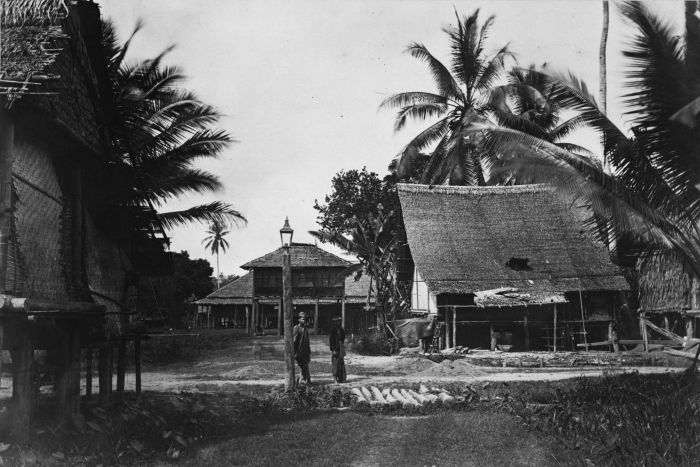 Foto. Het huis van de Sultan in Laboean, Deli